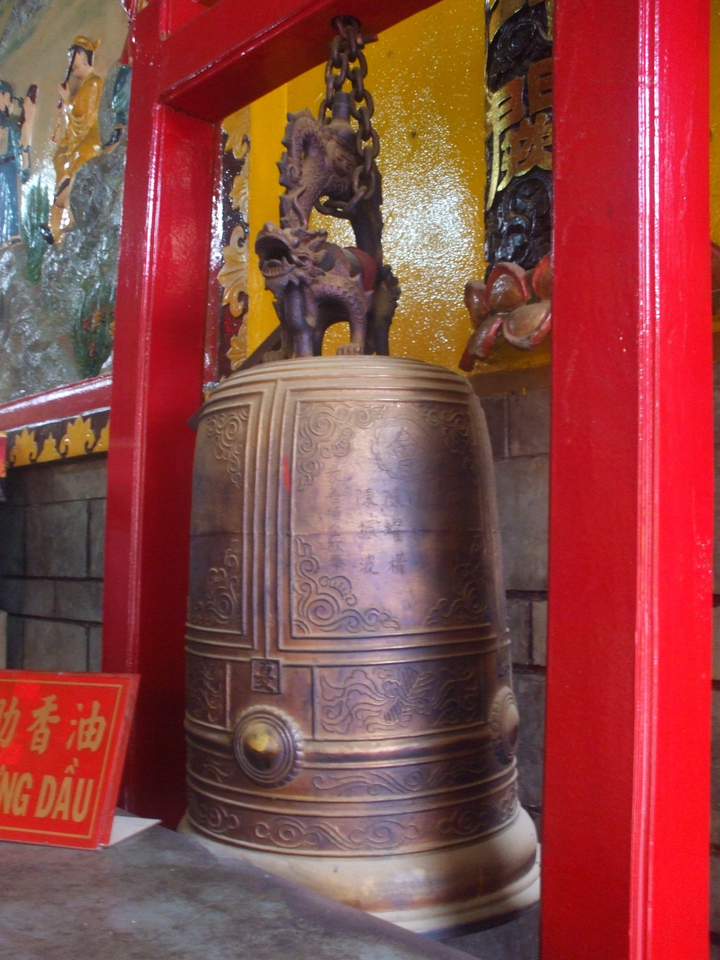 Chuông cổ trong Hội quán Hà Chương.